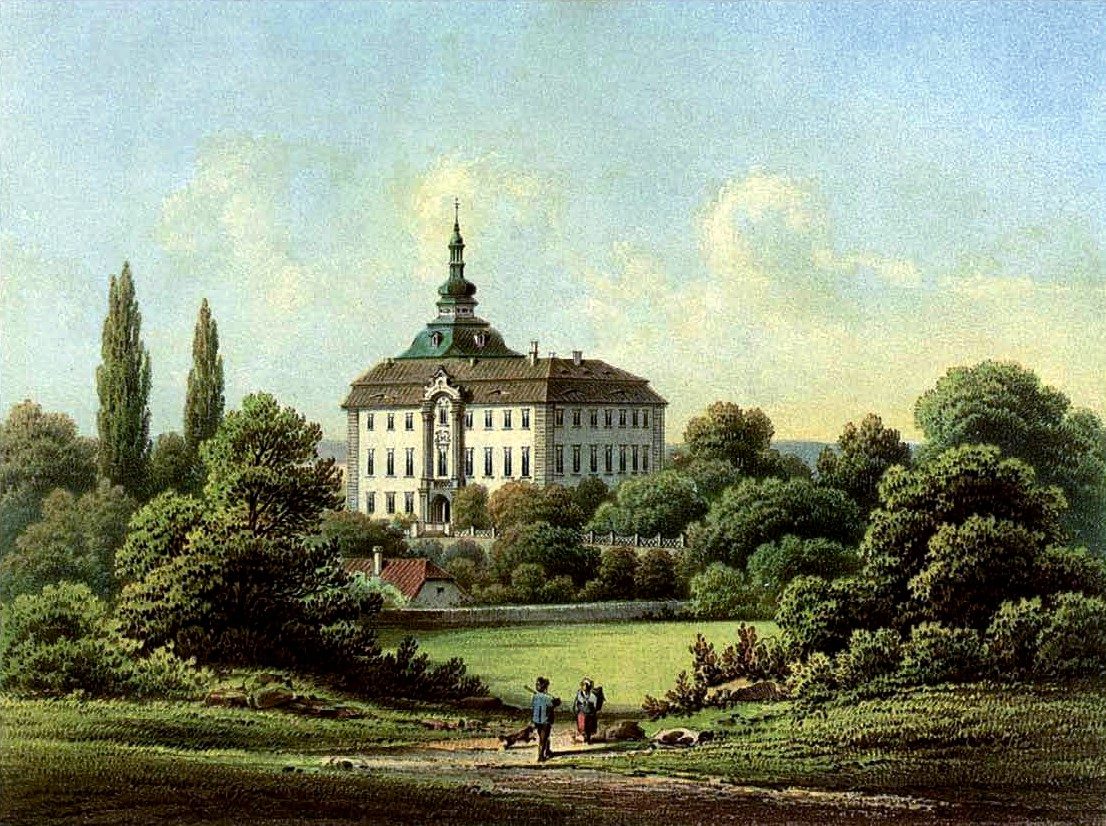 Schloss Groß Stein, Kreis Gross-Strehlitz